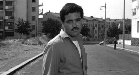 Screenshot from Mamma Roma directed by Pier Paolo Pasolini